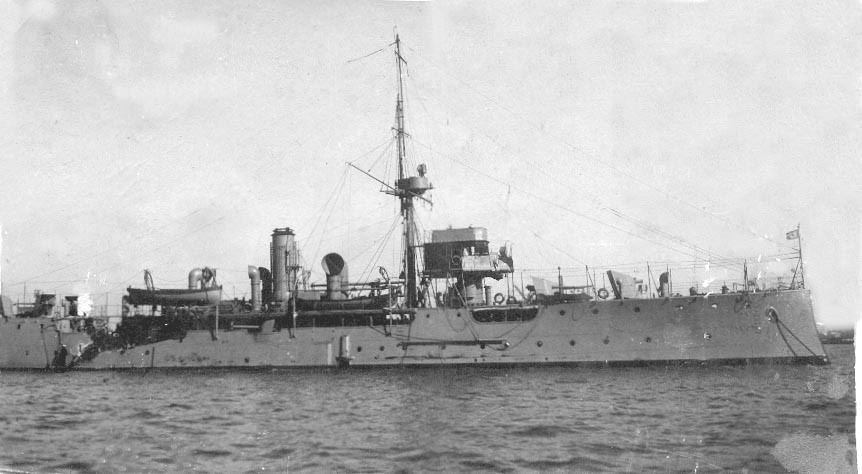 ARA Paraná (1908)